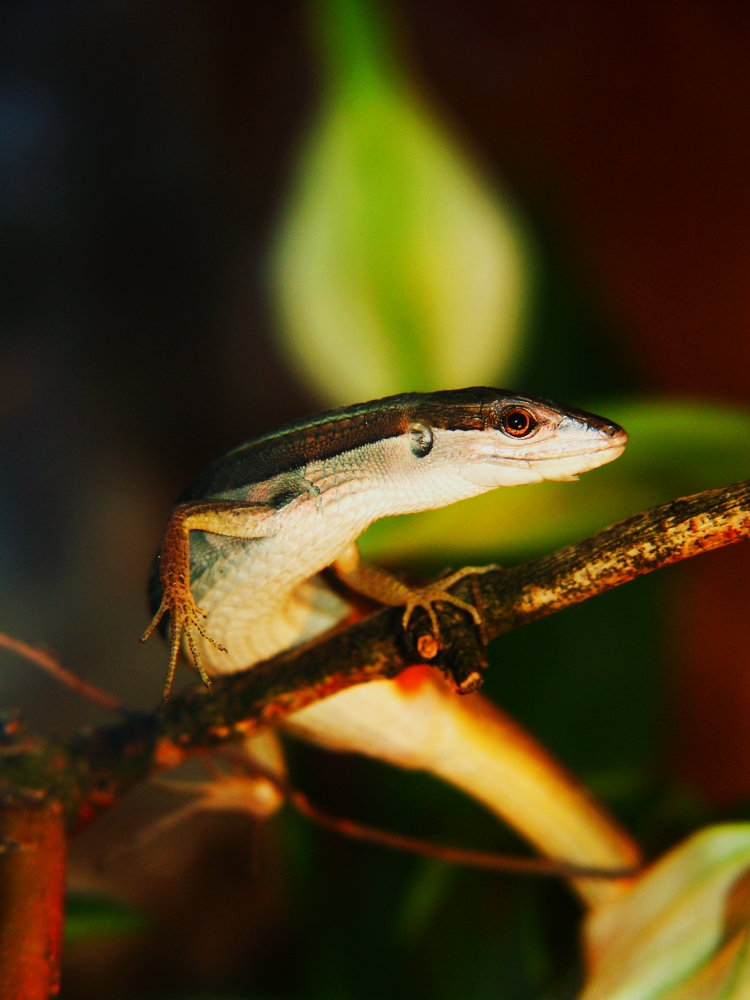 Takydromus sexlineatus female